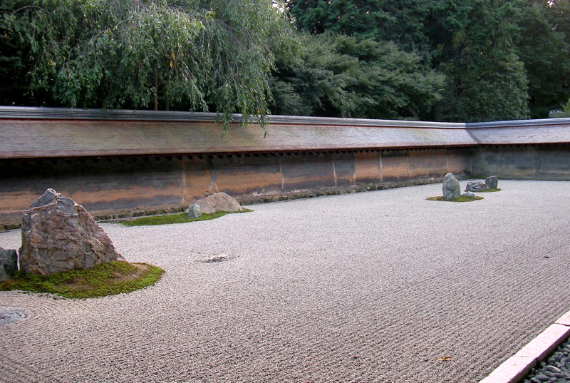 Stone garden at Ryoan-ji